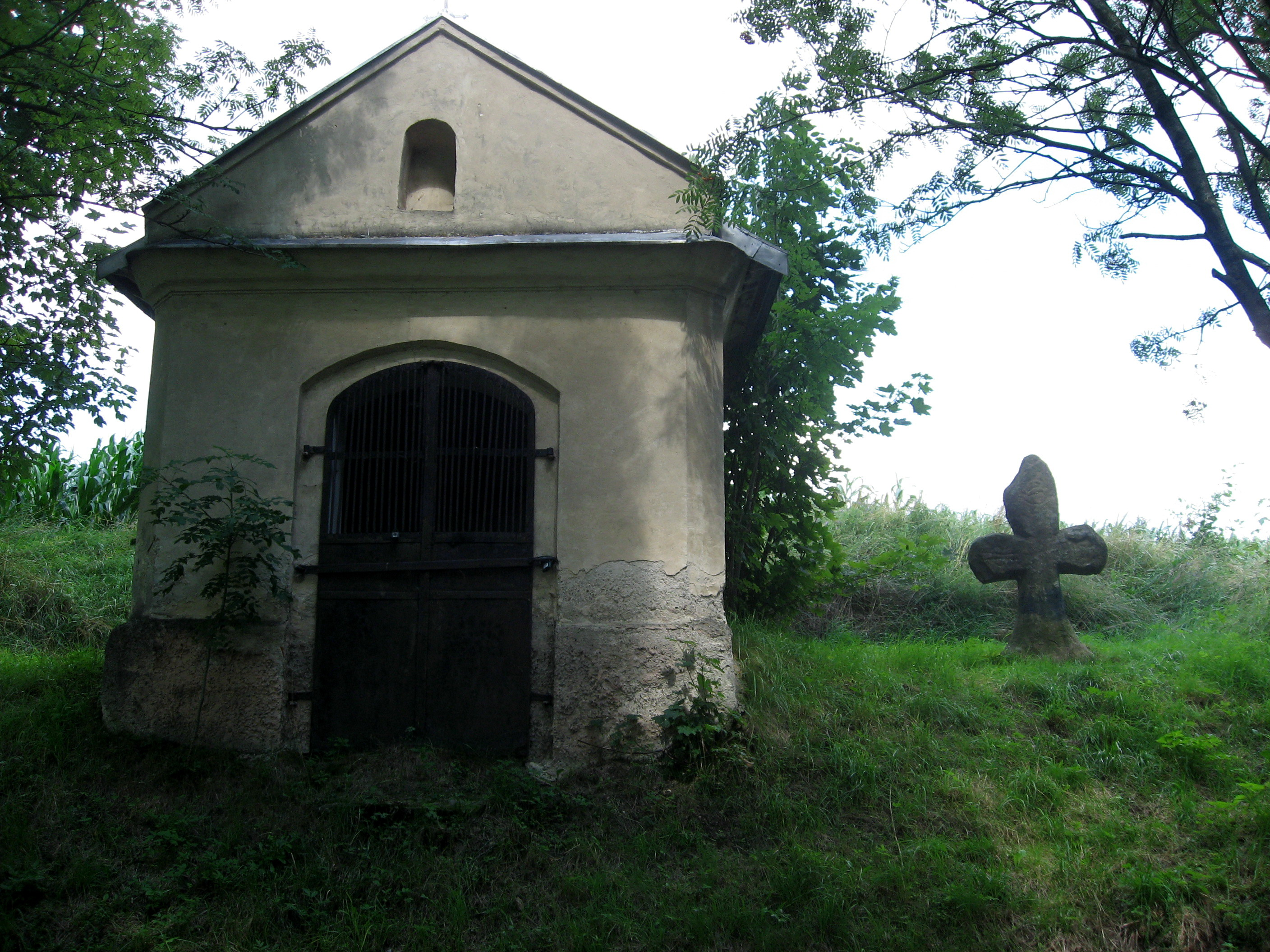 Kaple a smírčí kříž u Věžnice